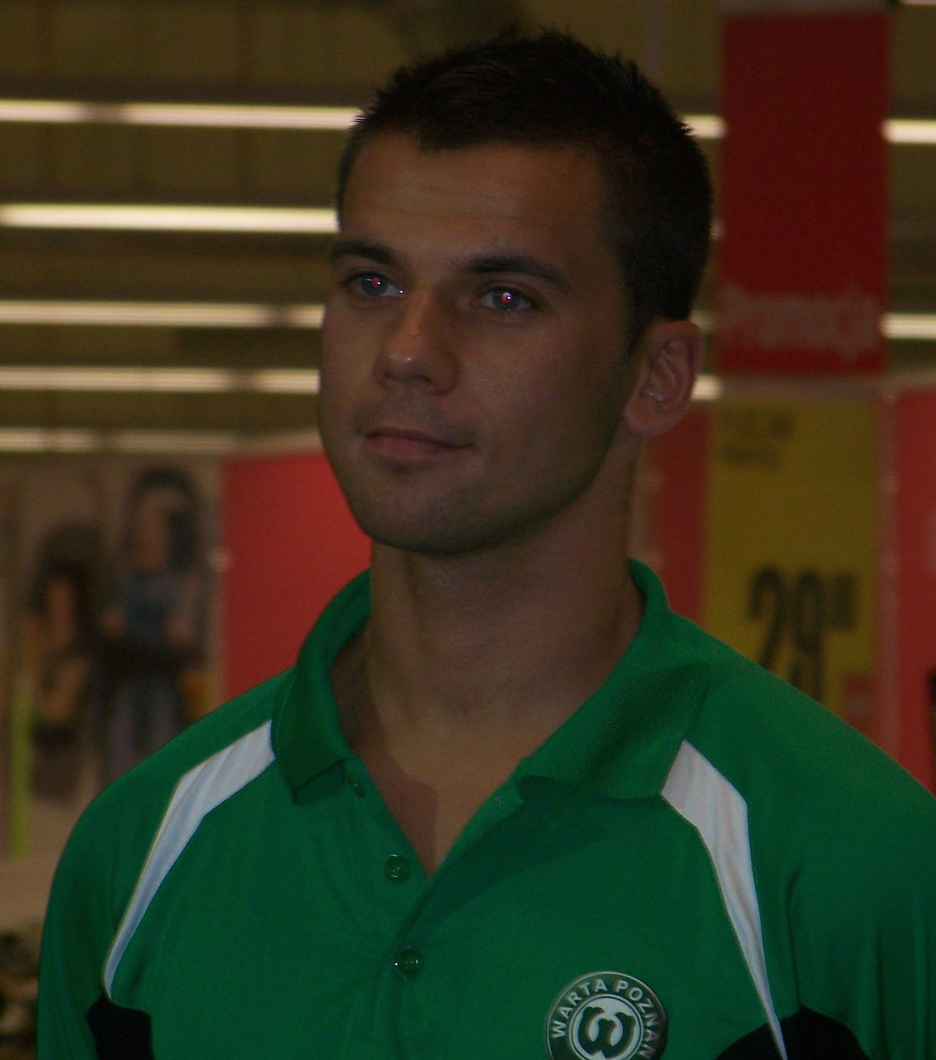 Filip Burkhardt podczas prezentacji Warty Poznań przed sezonem 2008/2009.